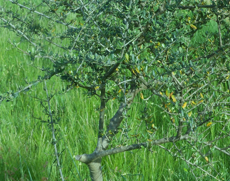 Olivier sauvage à allure d'Oléastre, en bordure de vigne (Claret, Héraut, France). Certaines feuilles sont attaquées par l'Oeil de Paon (Spilocea oleagina).